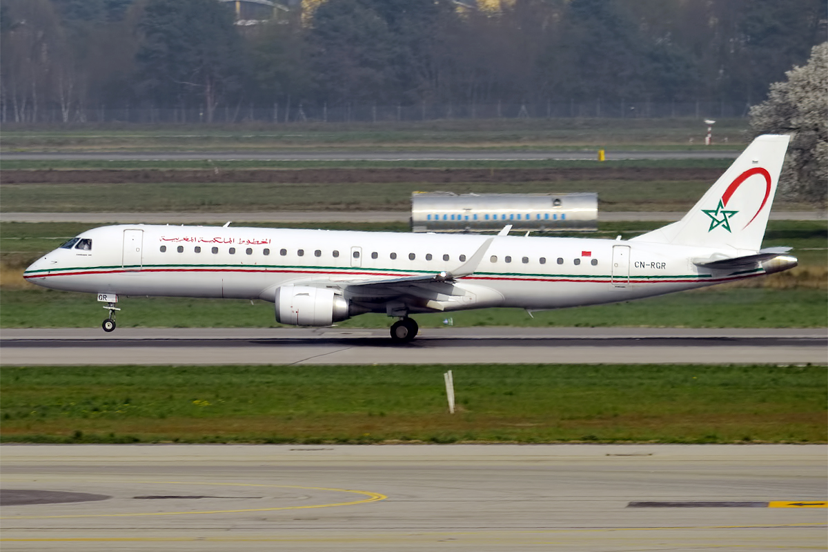 Royal Air Maroc, CN-RGR, Embraer ERJ-190AR